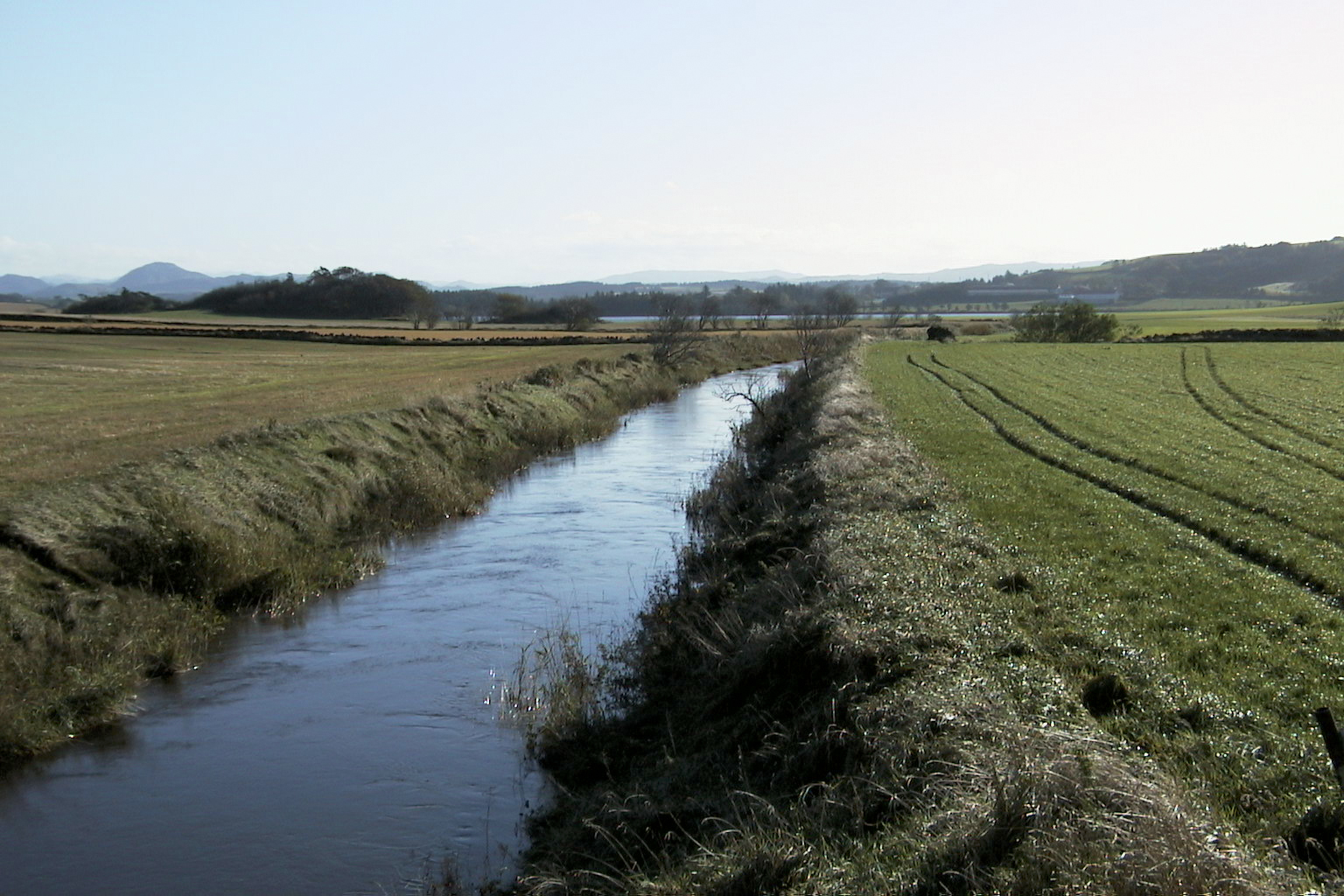 Bilde fra overvåkingsfeltet Skas-Heigre i JOVA programmet.